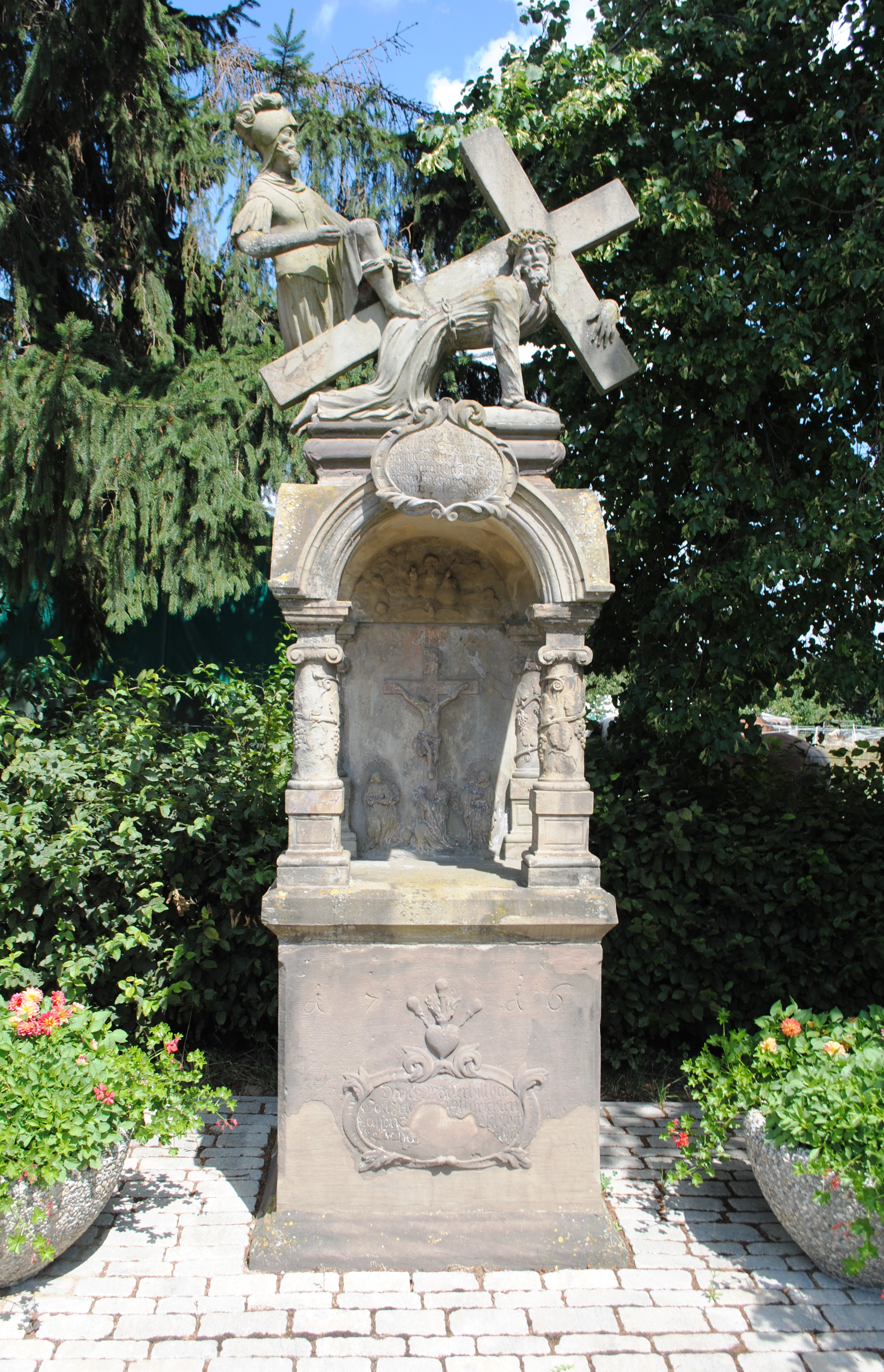 Tabernakelbildstock, Volkach-Obervolkach